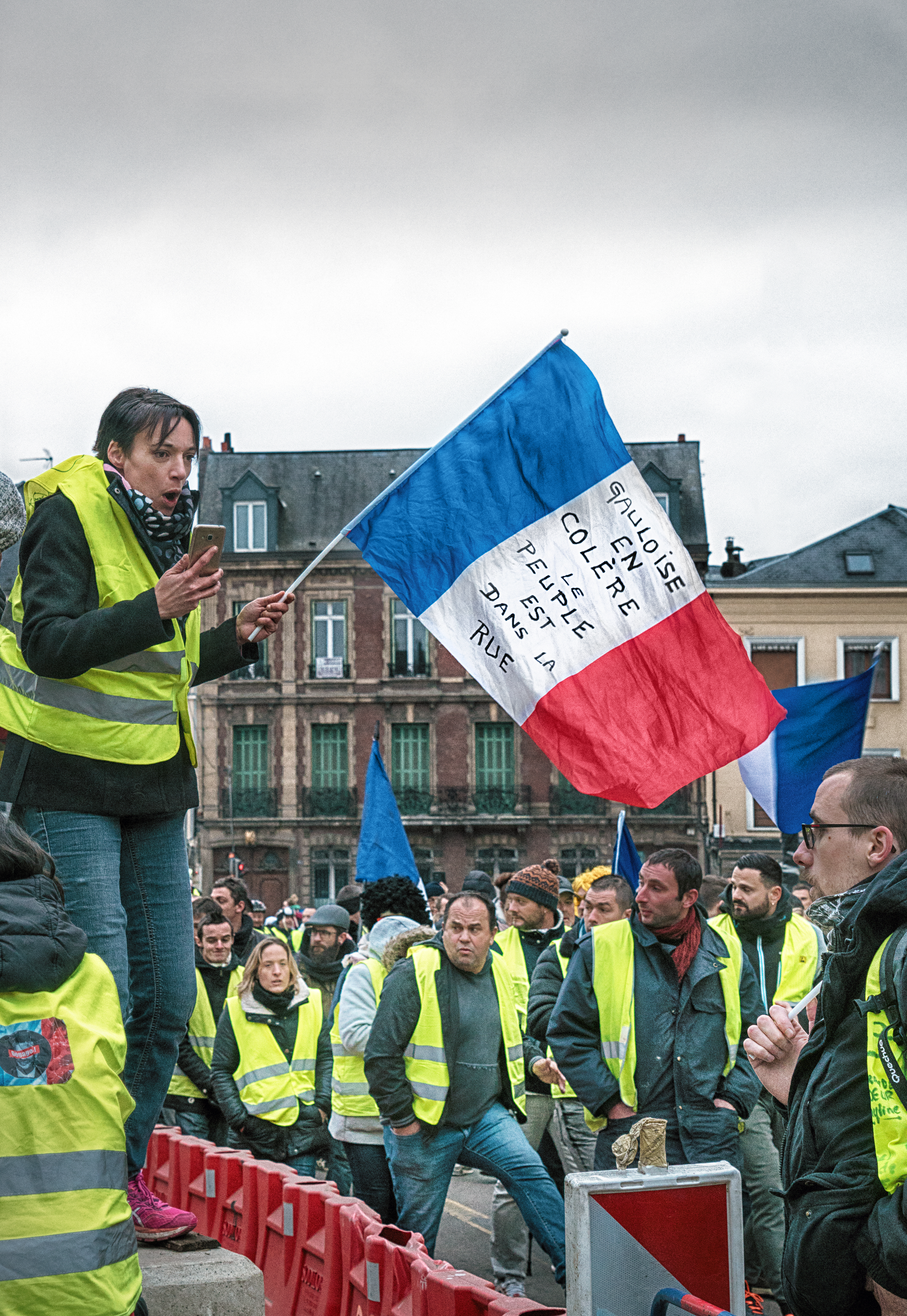 2019-01 Manif. Rouen-04-2019-01-05